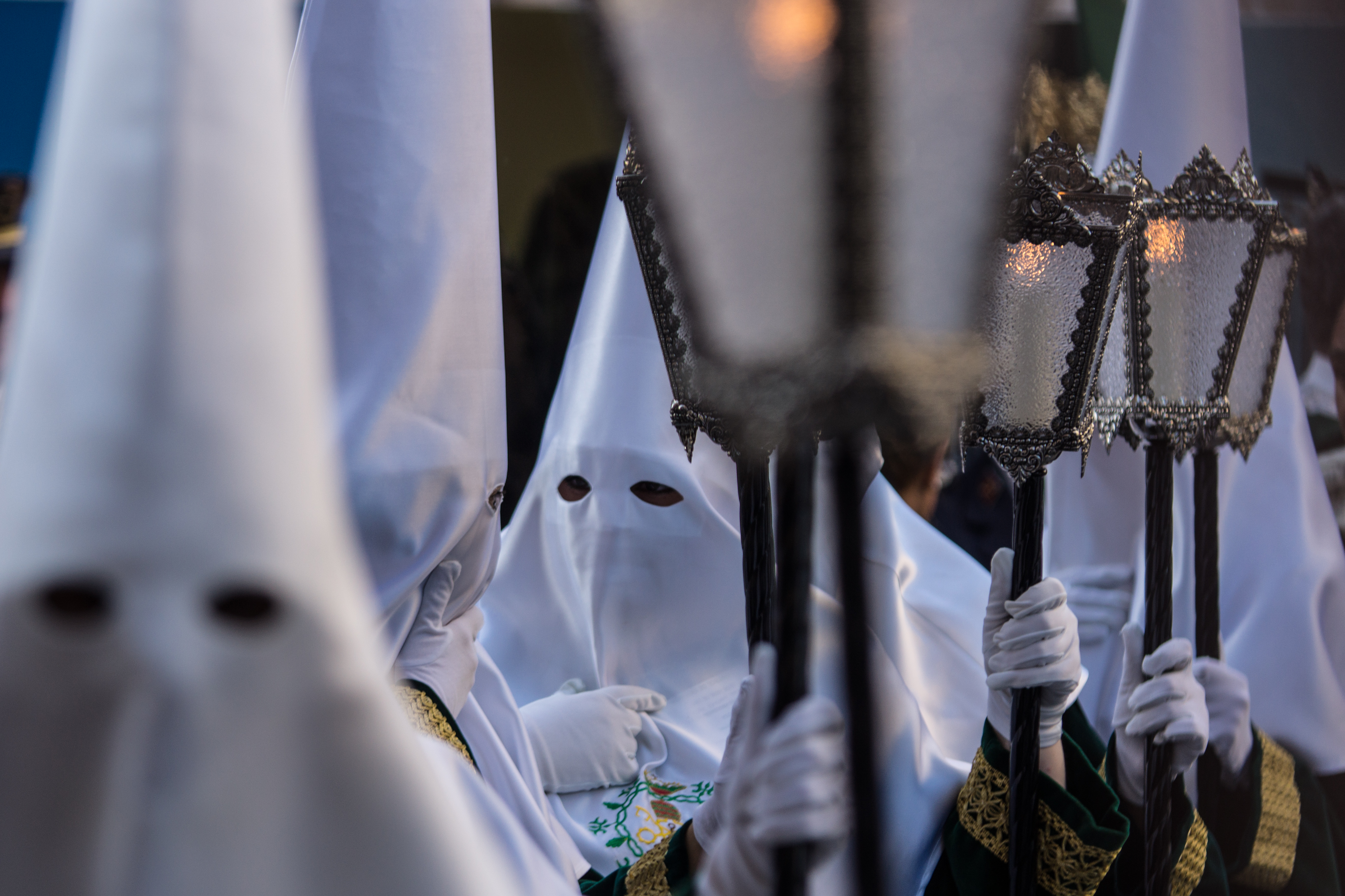 Cofradia de la Esperanza. Nazarenos. This is a photography of a Folklore festival in Spain (Wikidata id Q5685566).